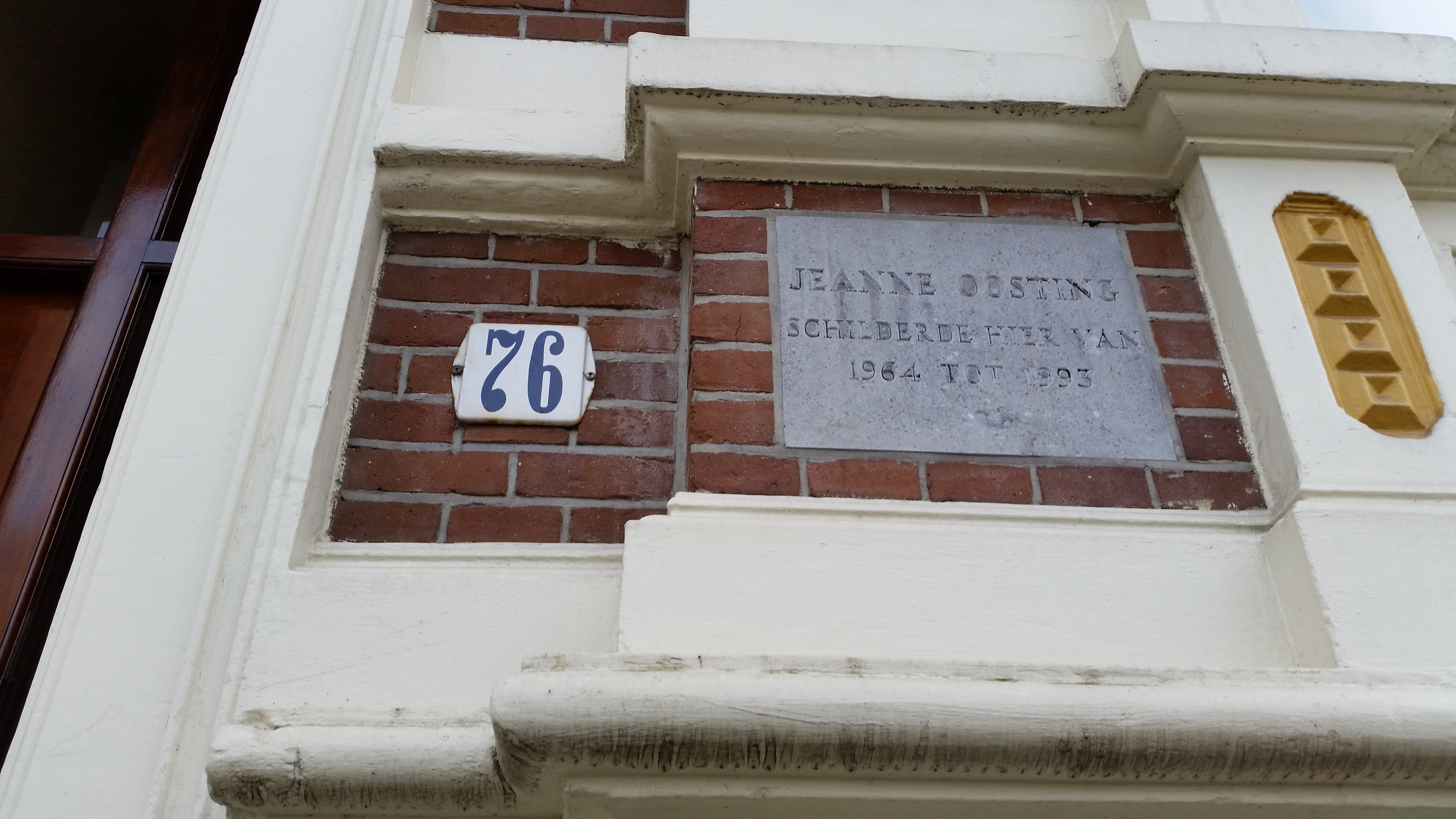 Impressie van de Oosterpark als straat in Amsterdam-Oost (februari 2020) met plaquette Jeanne Oosting